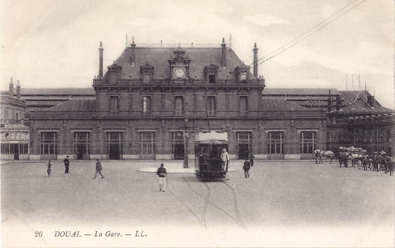 Carte postale ancienne éditée par LL, n°26 : DOUAI - La Gare